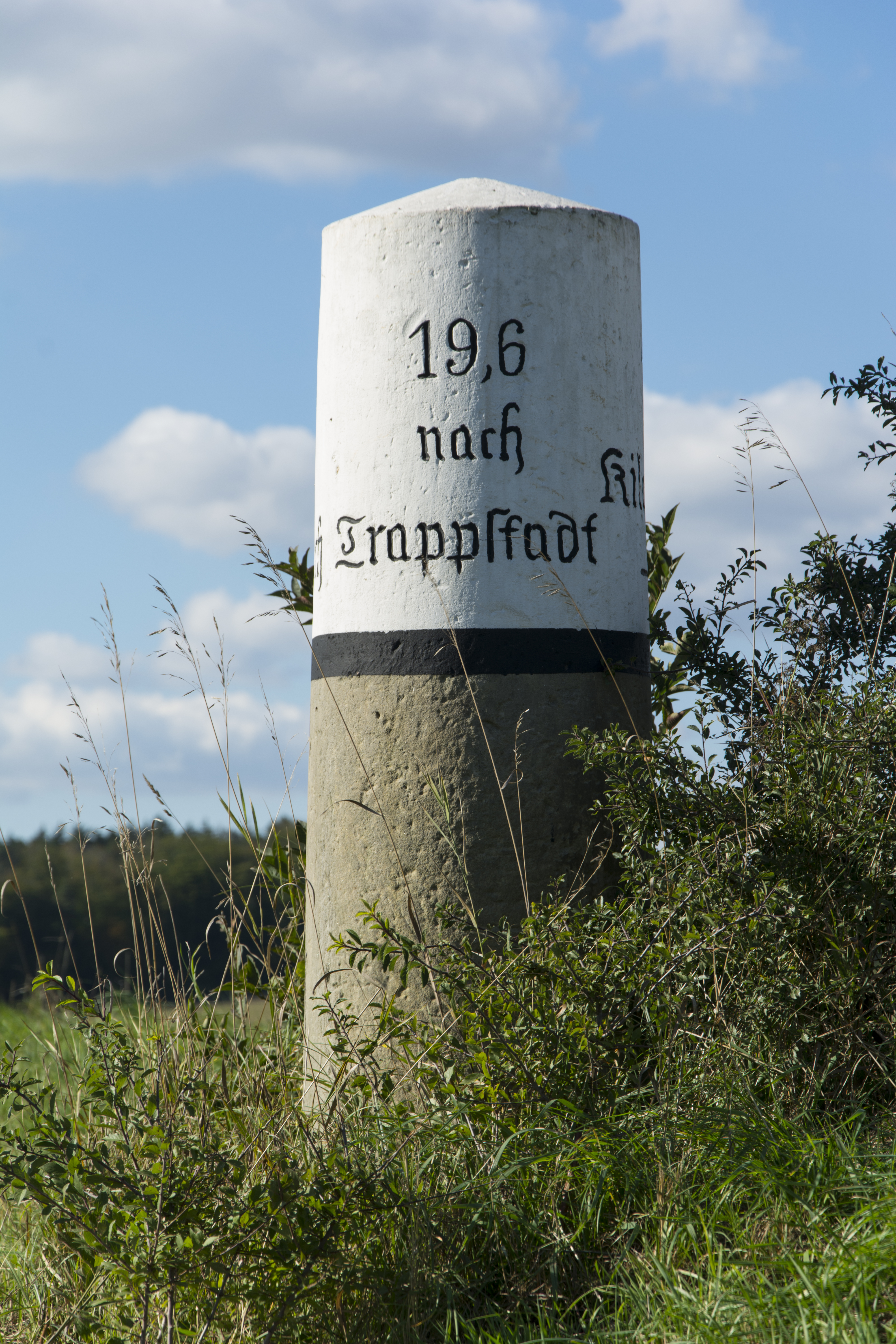 Kilometerstein an der 279 nahe Ortsausgang Maroldsweisach Richtung ErmershausenThis is a photograph of an architectural monument.